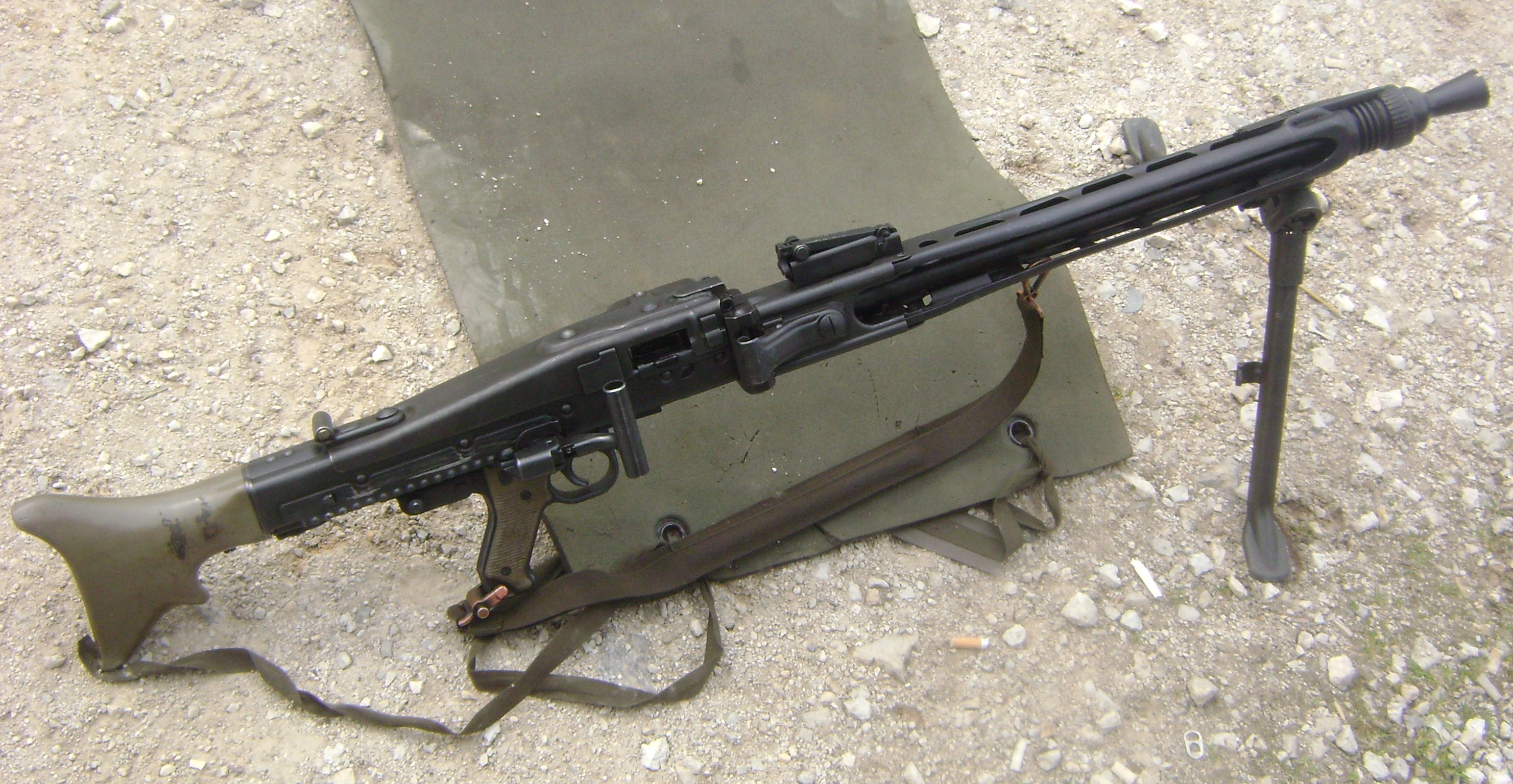 Maschinengewehr 74 (MG 74)